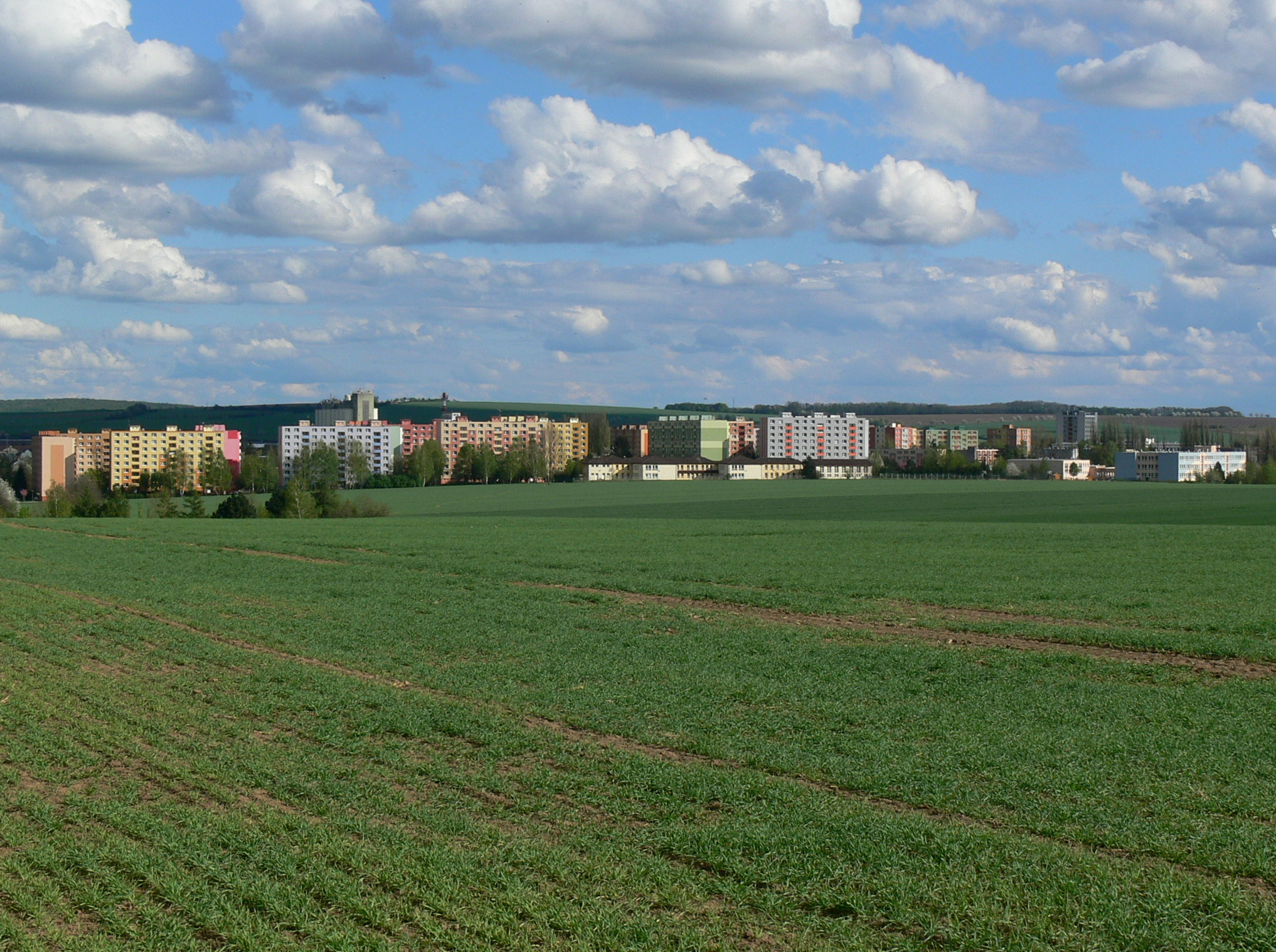 Dědice, sídliště Osvobození